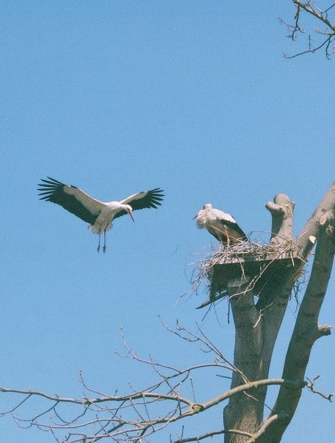 Лелека білий в польоті. Лелека білий здійснює посадку на своє гніздо